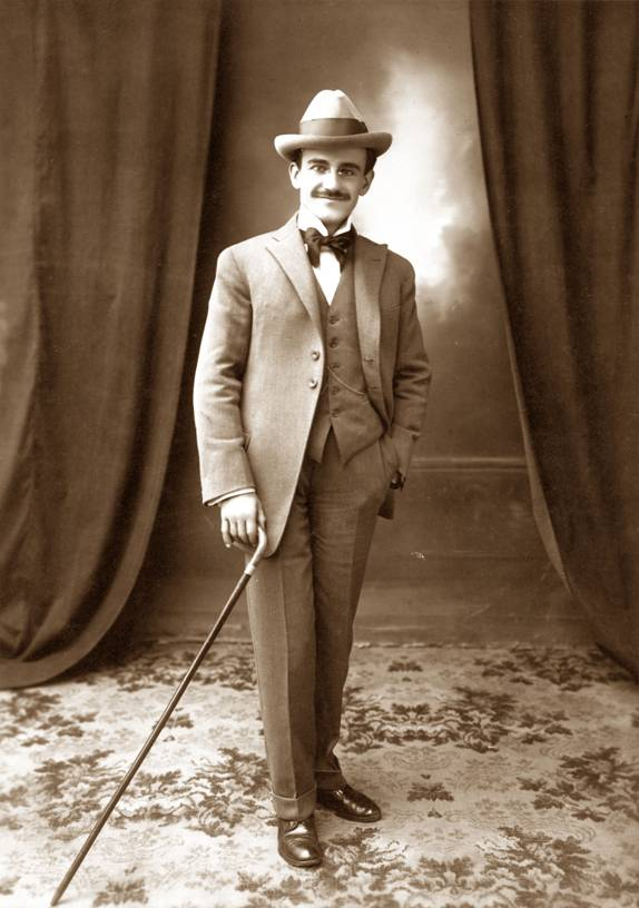 Dn. Manuel Perez Chaves